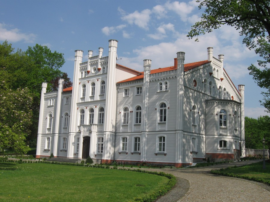 Drzeczkowo, pałac (zabytek nr rejestr. 228/1-4/Wlkp/A)